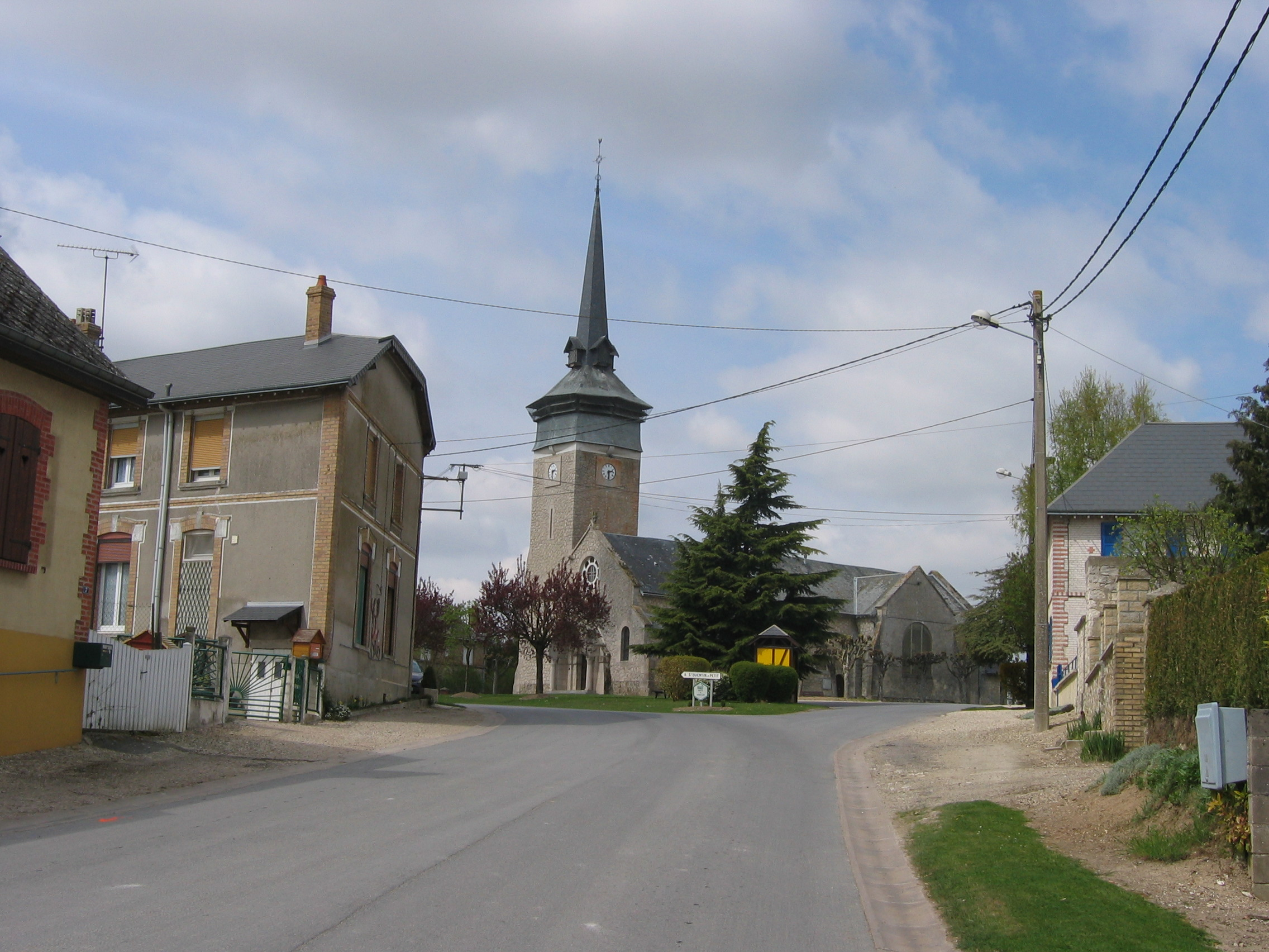 Arrivée sur l'église de Banogne - Banogne-Recouvrance Ardennes France